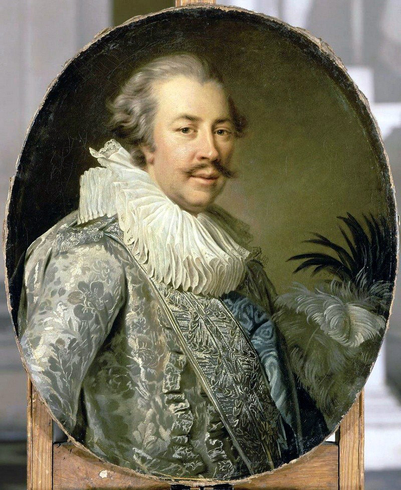 Louise Hercule Timoleon